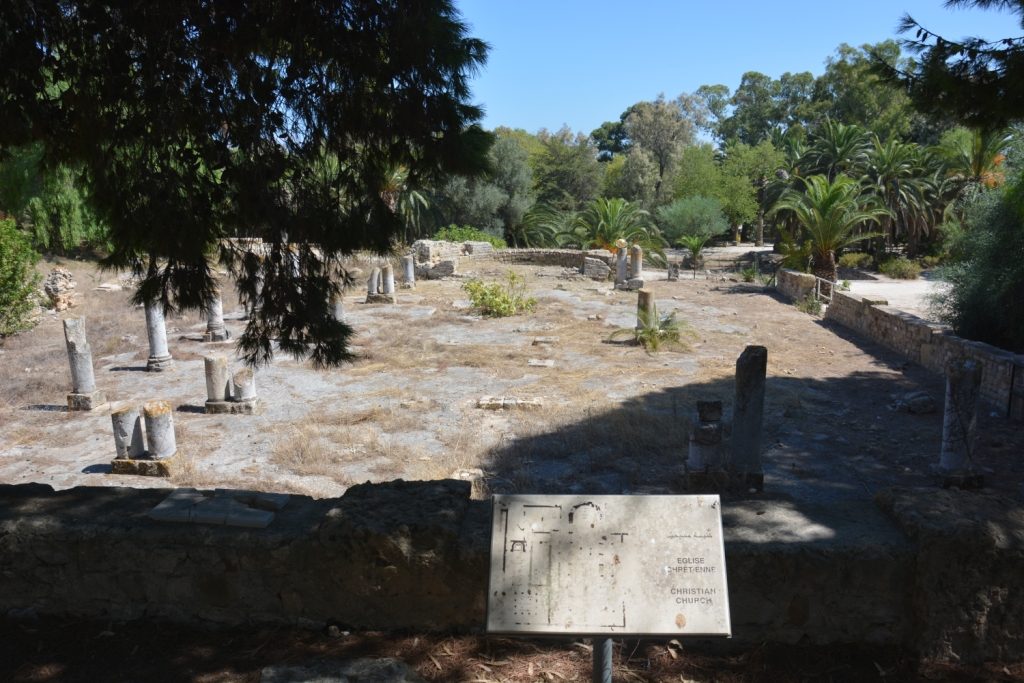 Basilique byzantine de Dermech (fouilles de 1899), Carthage